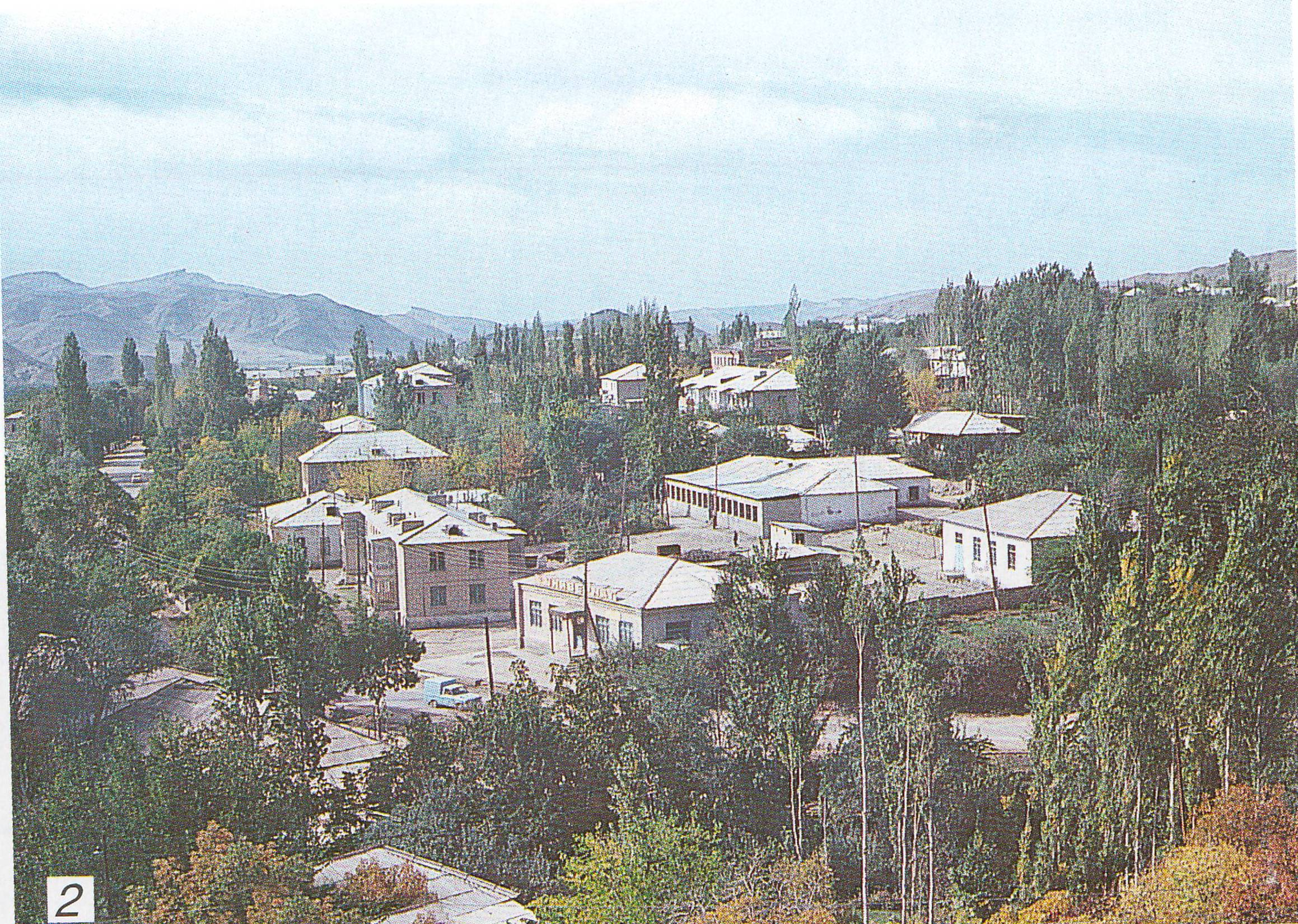 Şahbuz qəsəbəsi